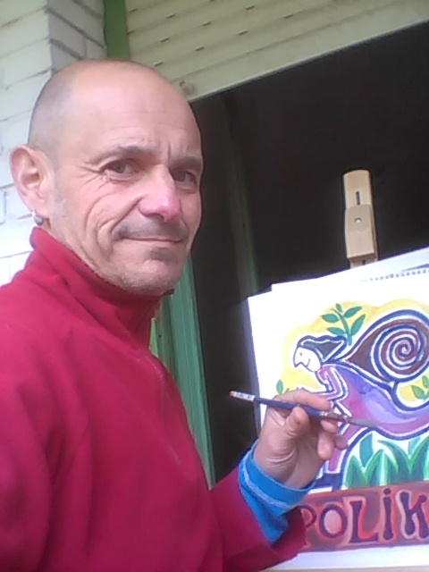 Iñaki Martiarena "Mattin"